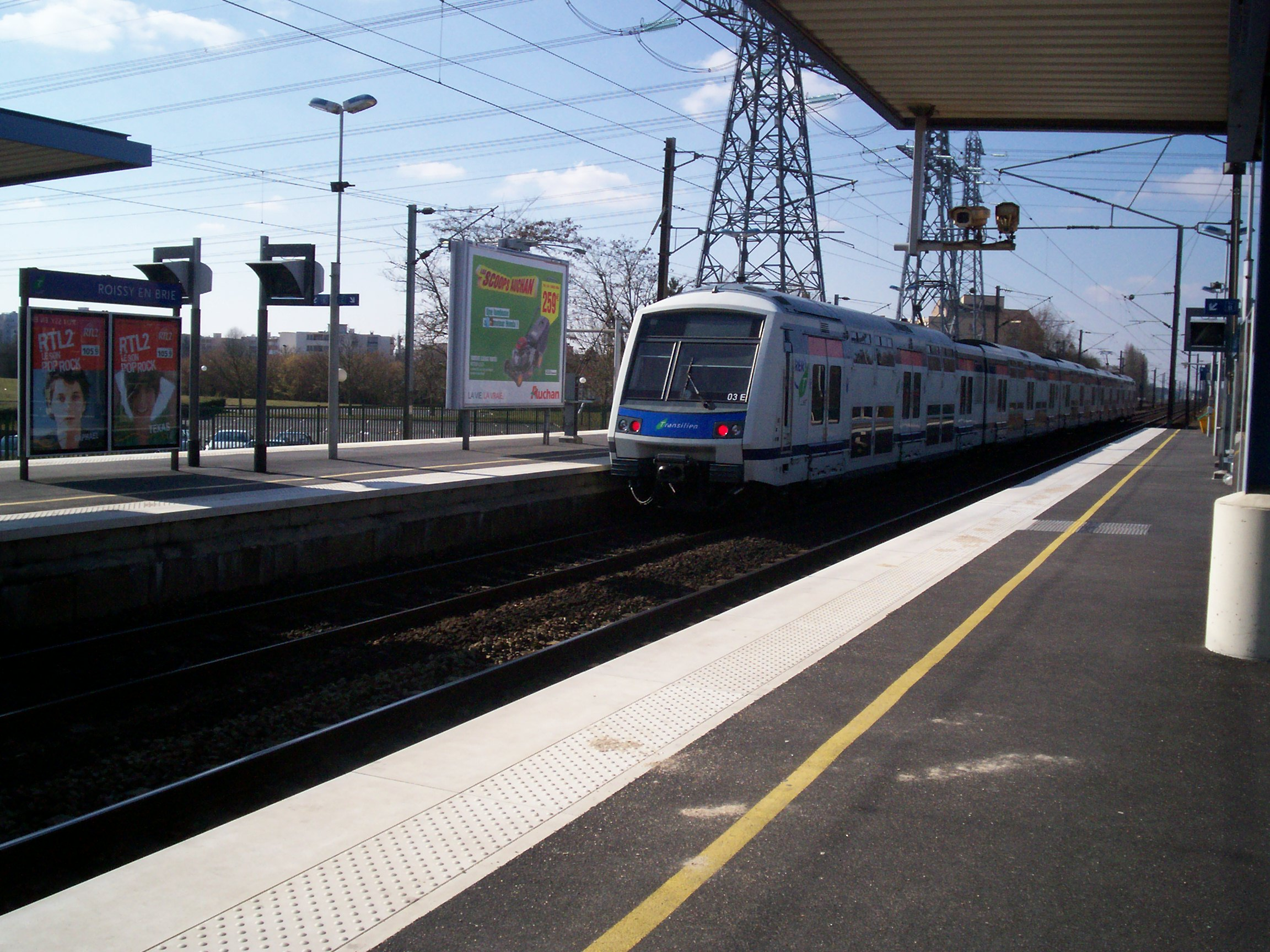 RER E - Gare de Roissy-en-Brie